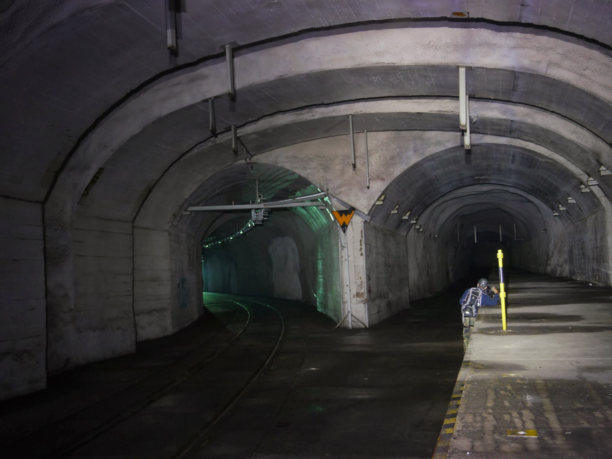 Ladebordwand in Komplexlager 12 mit Bahnanschlussgleis links